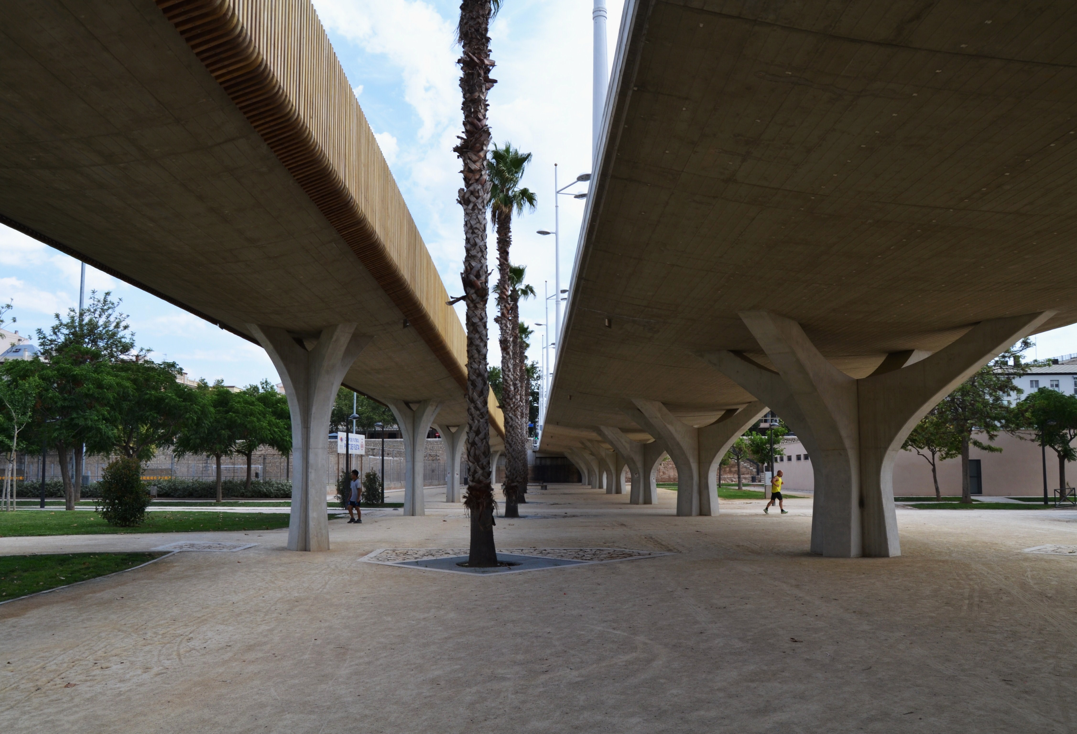 Pont de Fusta des de baix, València.